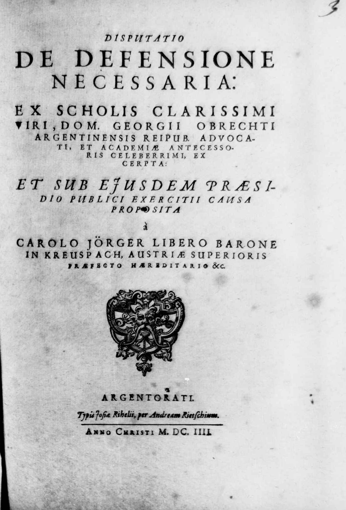 Frontespizio